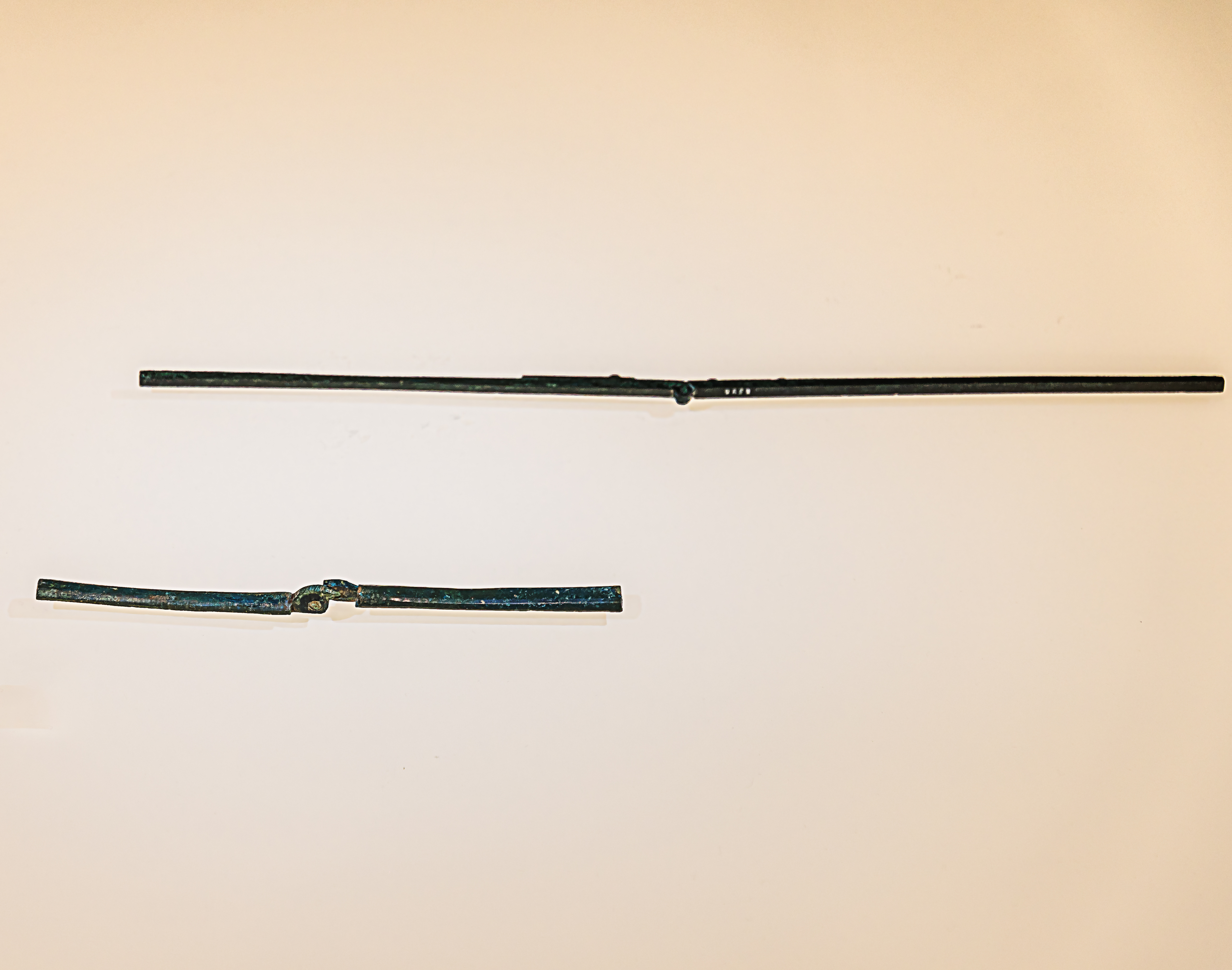 Zwei Längenmaßstäbe aus Bronze mit Scharnieren, die ausgeklappt das römische Längenmaß von 1 Fuß und ½ Fuß (pes) anzeigen.